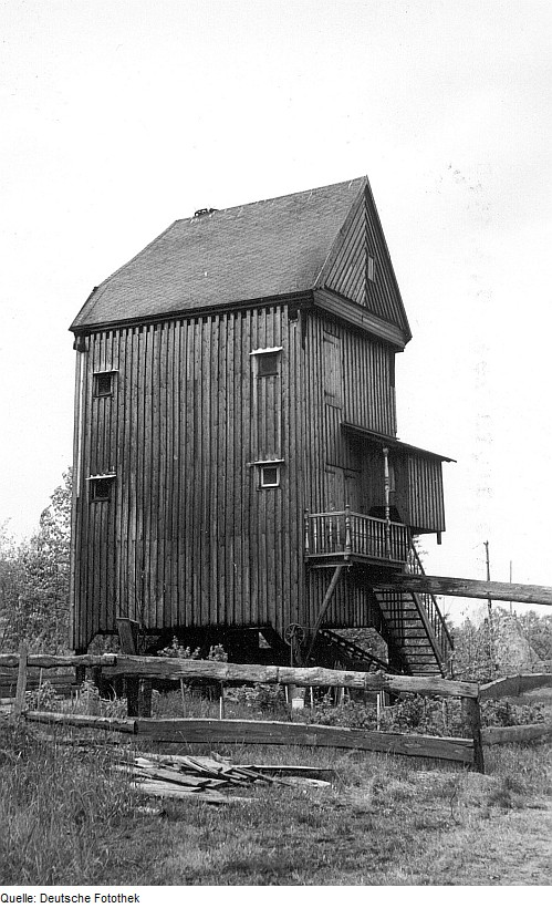 Original image description from the Deutsche Fotothek Märkische Heide-Hohenbrück. Bockmühle